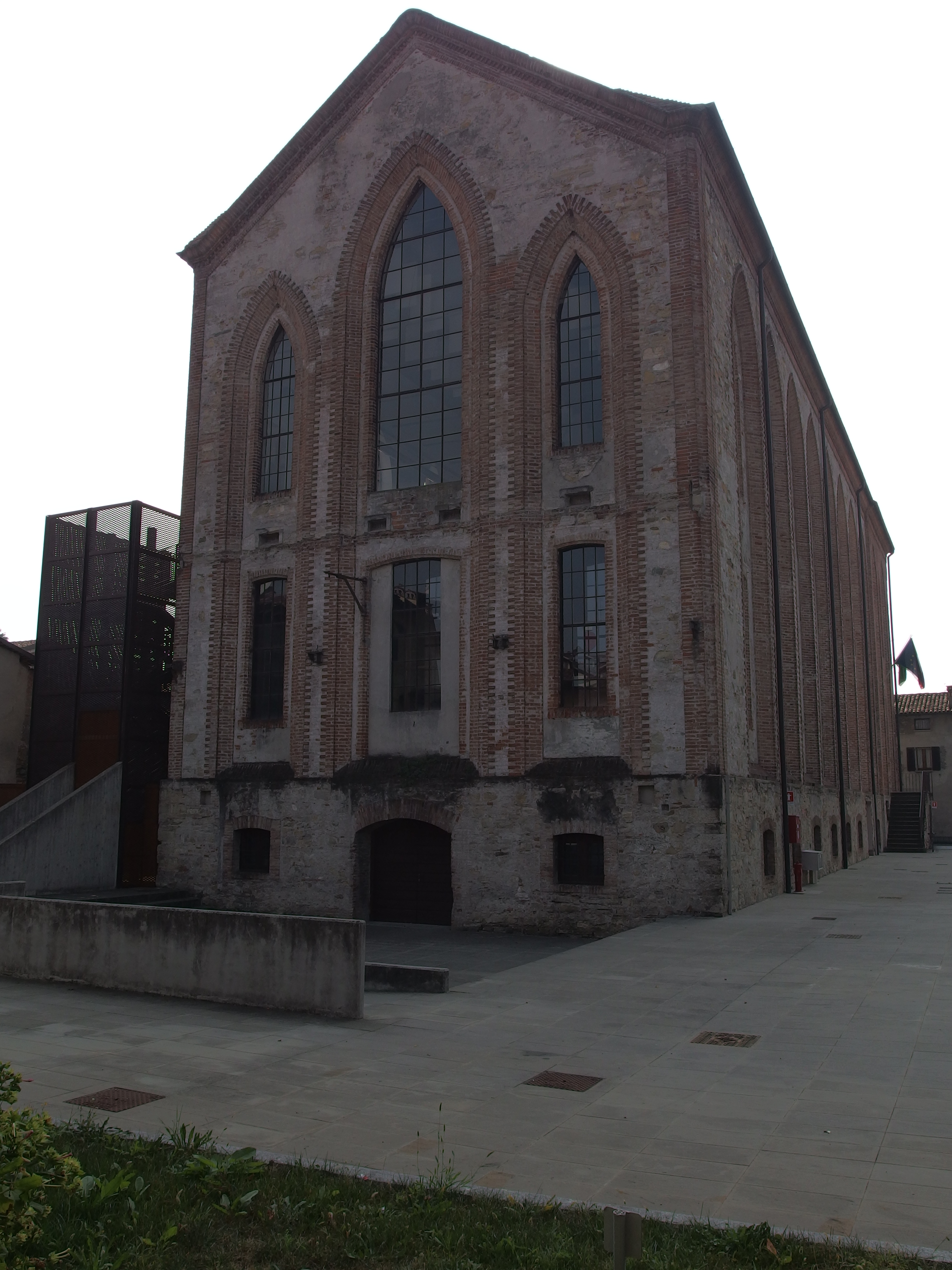 Il Filandrone This is a photo of a monument which is part of cultural heritage of Italy.